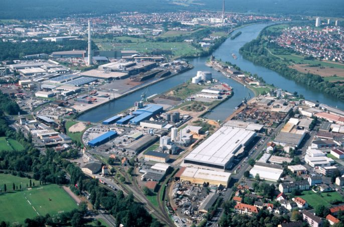 Luftbild bayernhafen Aschaffenburg